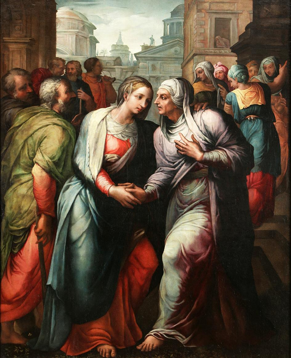 The Visitationlabel QS:Len,"The Visitation"label QS:Les,"Visitación"label QS:Lit,"Visitazione"